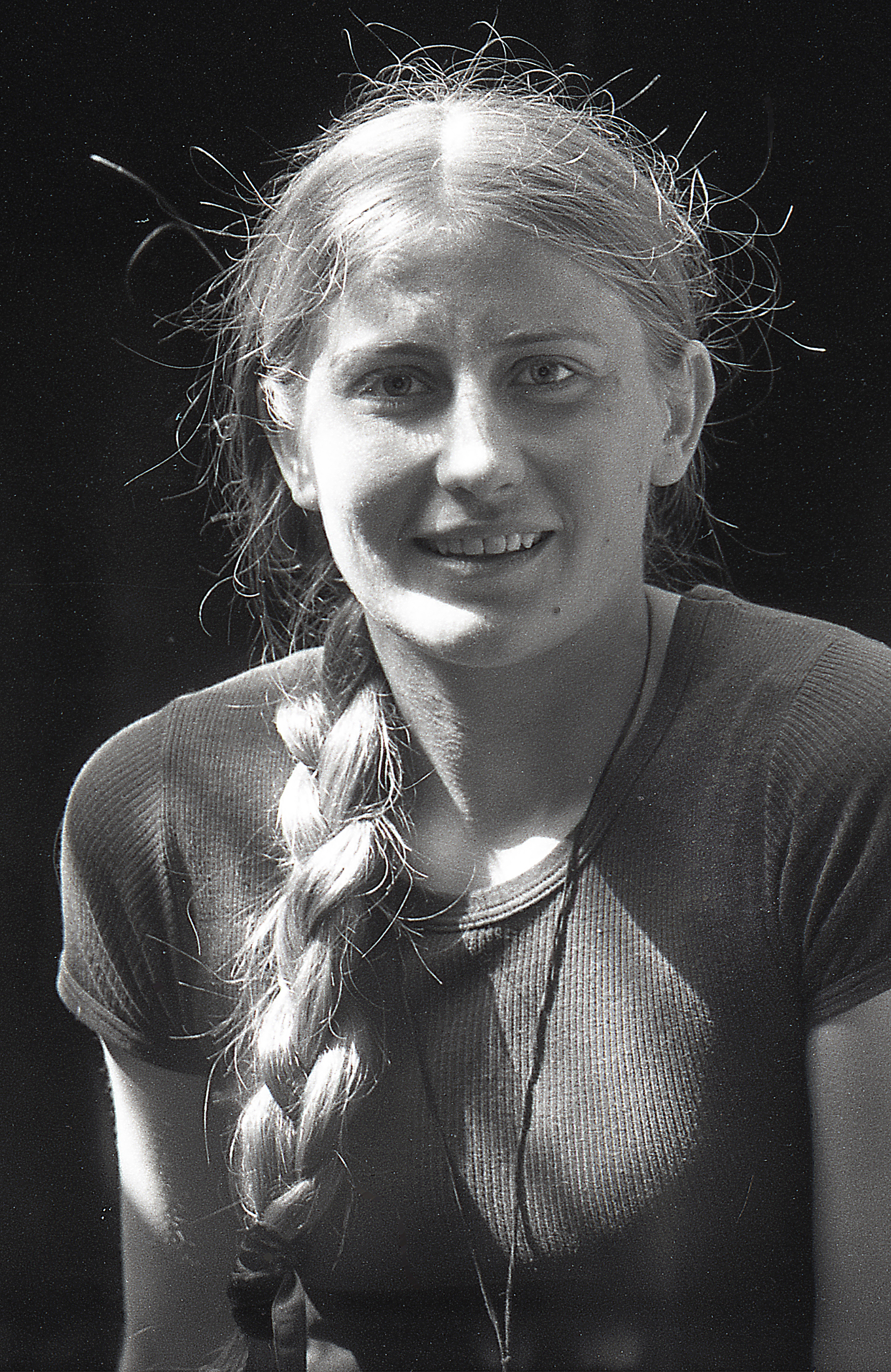 Anu Kallavus.